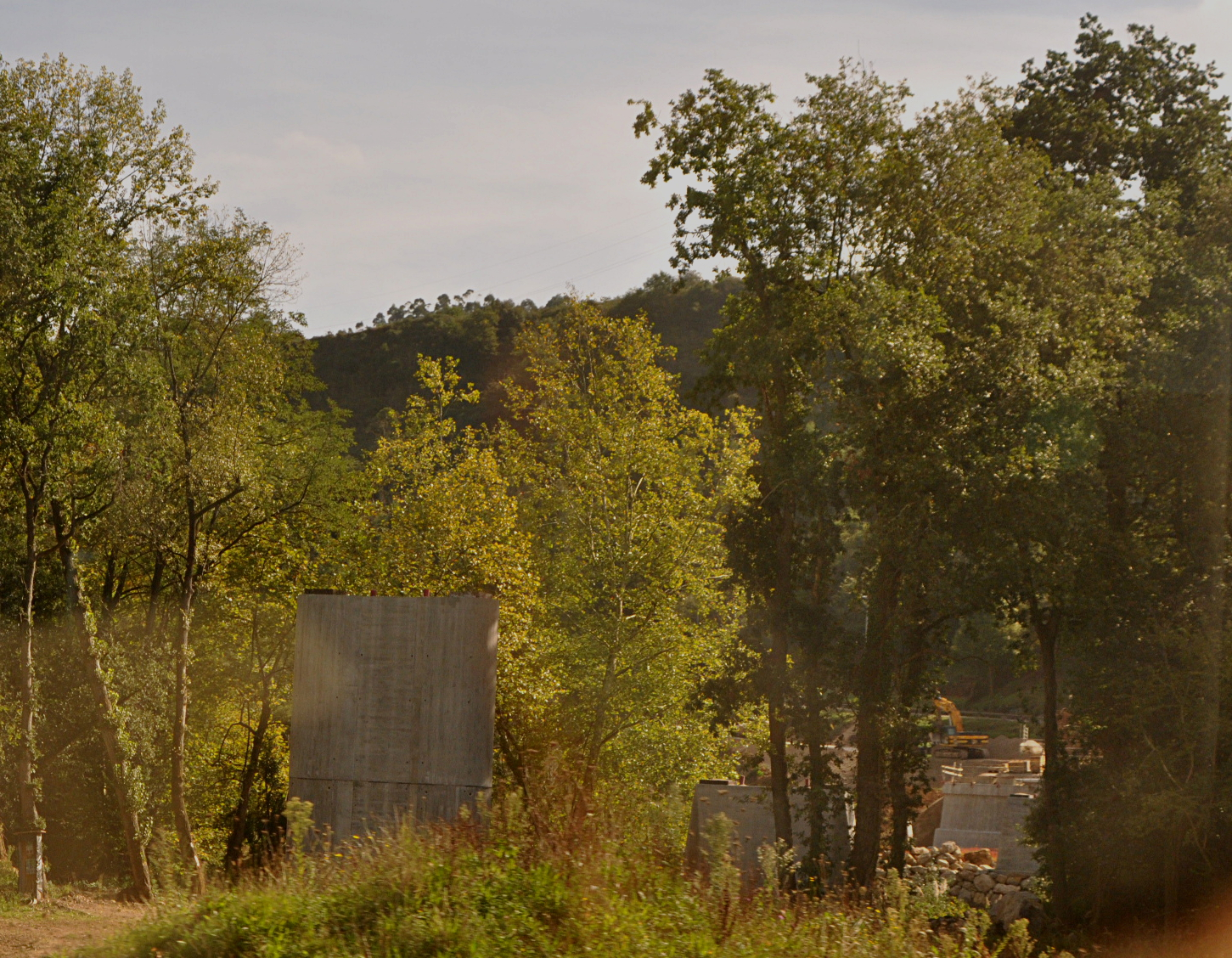 Obras del nuevo puente sobre en río Saja a la altura de la localidad de Golbardo.